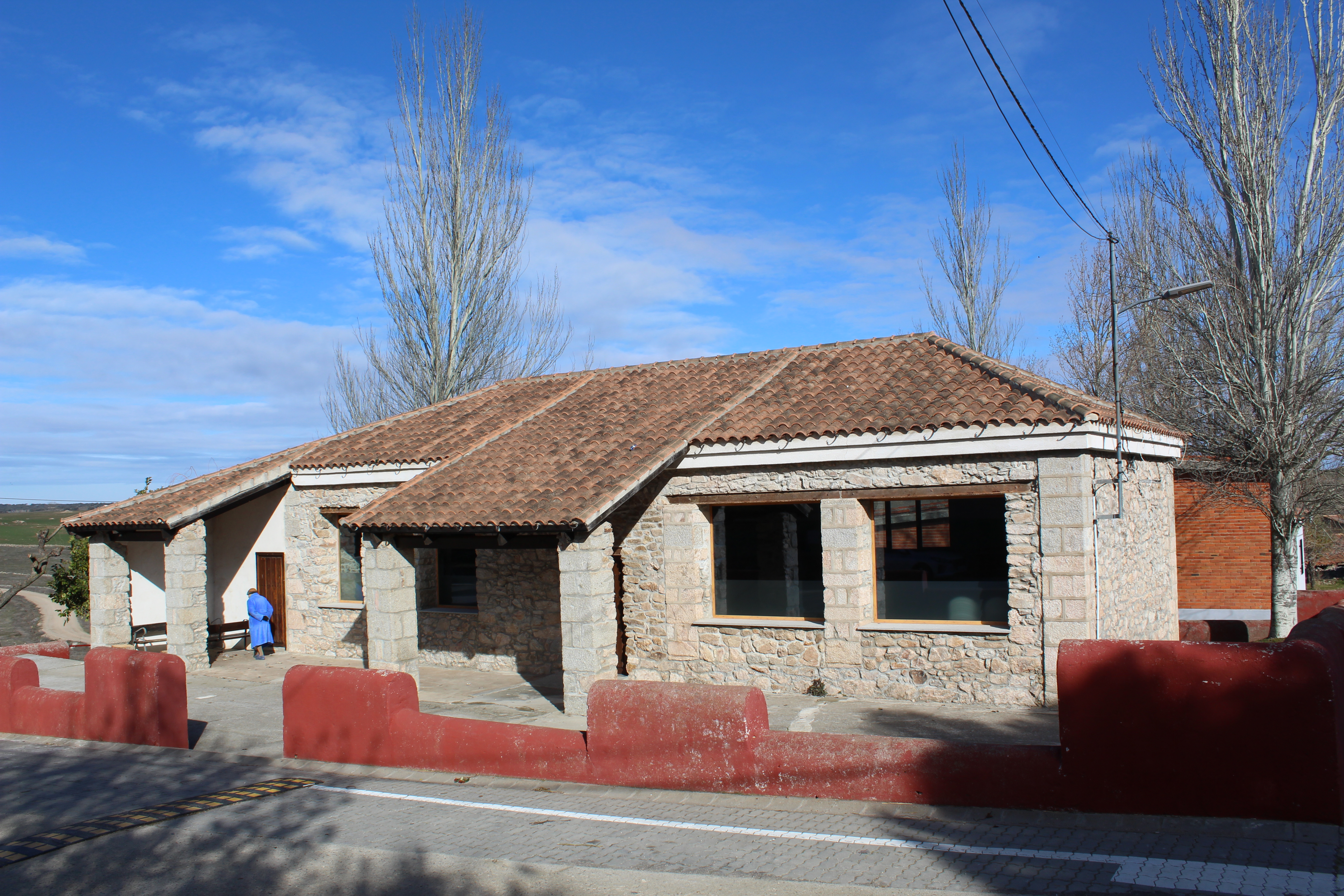 Antiguas escuelas de Buenavista, en el siglo XXI están cerradas y se utilizan como lugar de reunión en el pueblo.